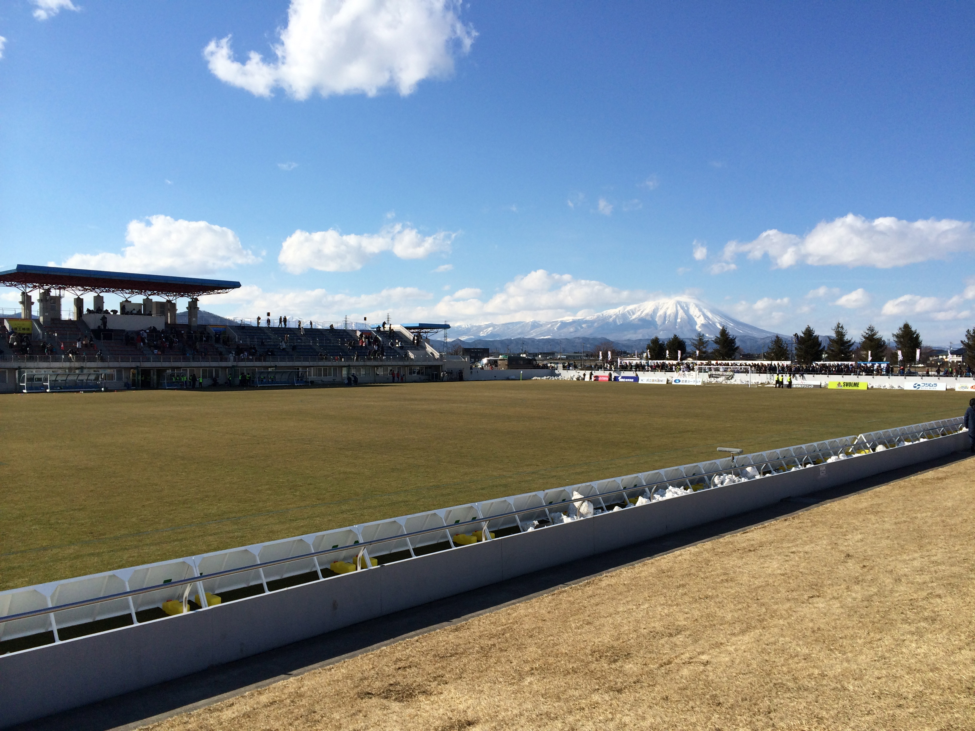 盛岡南公園球技場